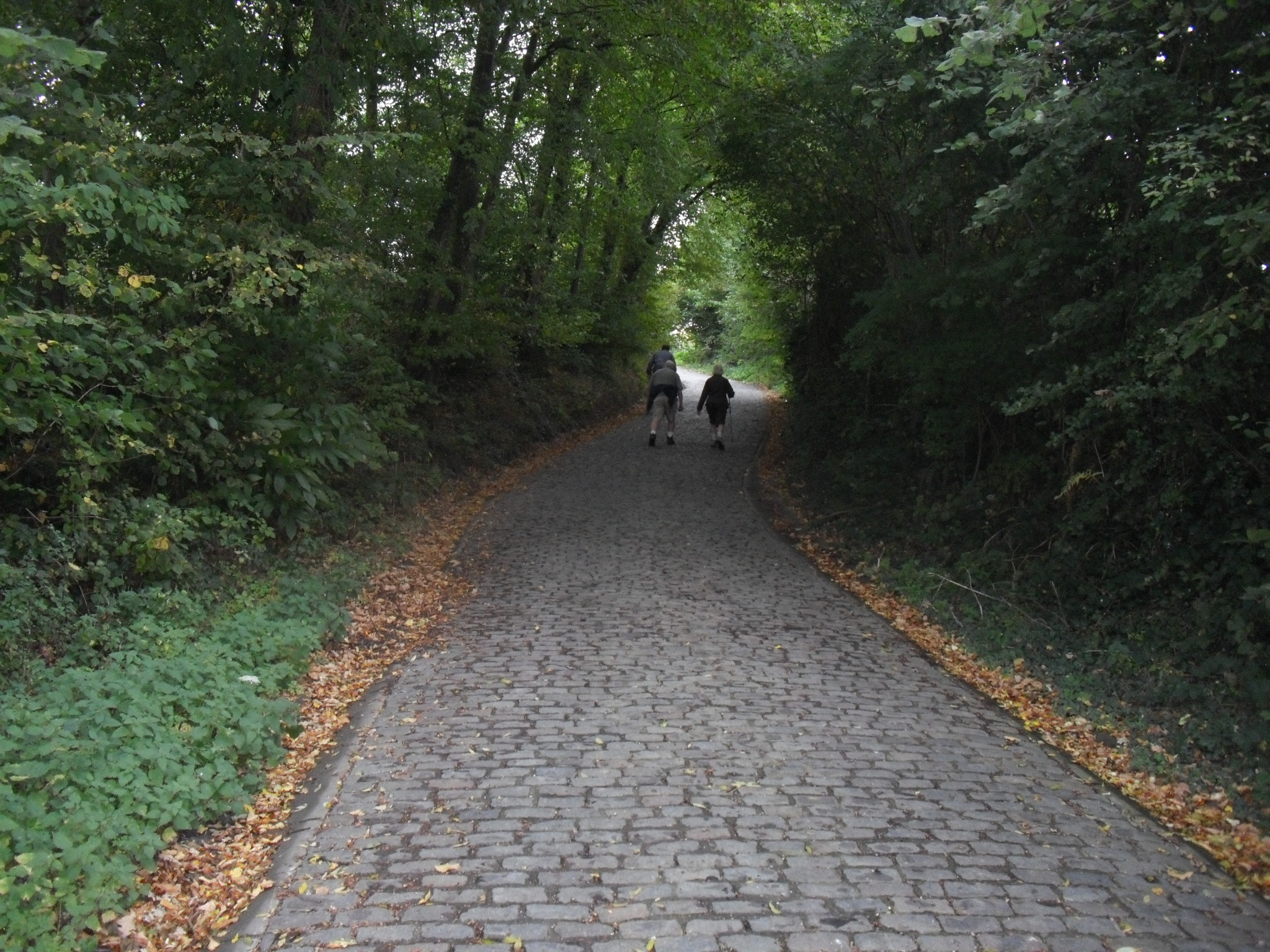 Rampe (straat en helling) - Kluisbergen - België